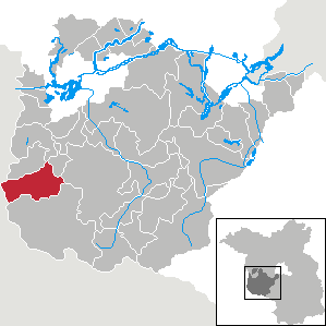 Görzke in Brandenburg (Country) - District Potsdam-Mittelmark